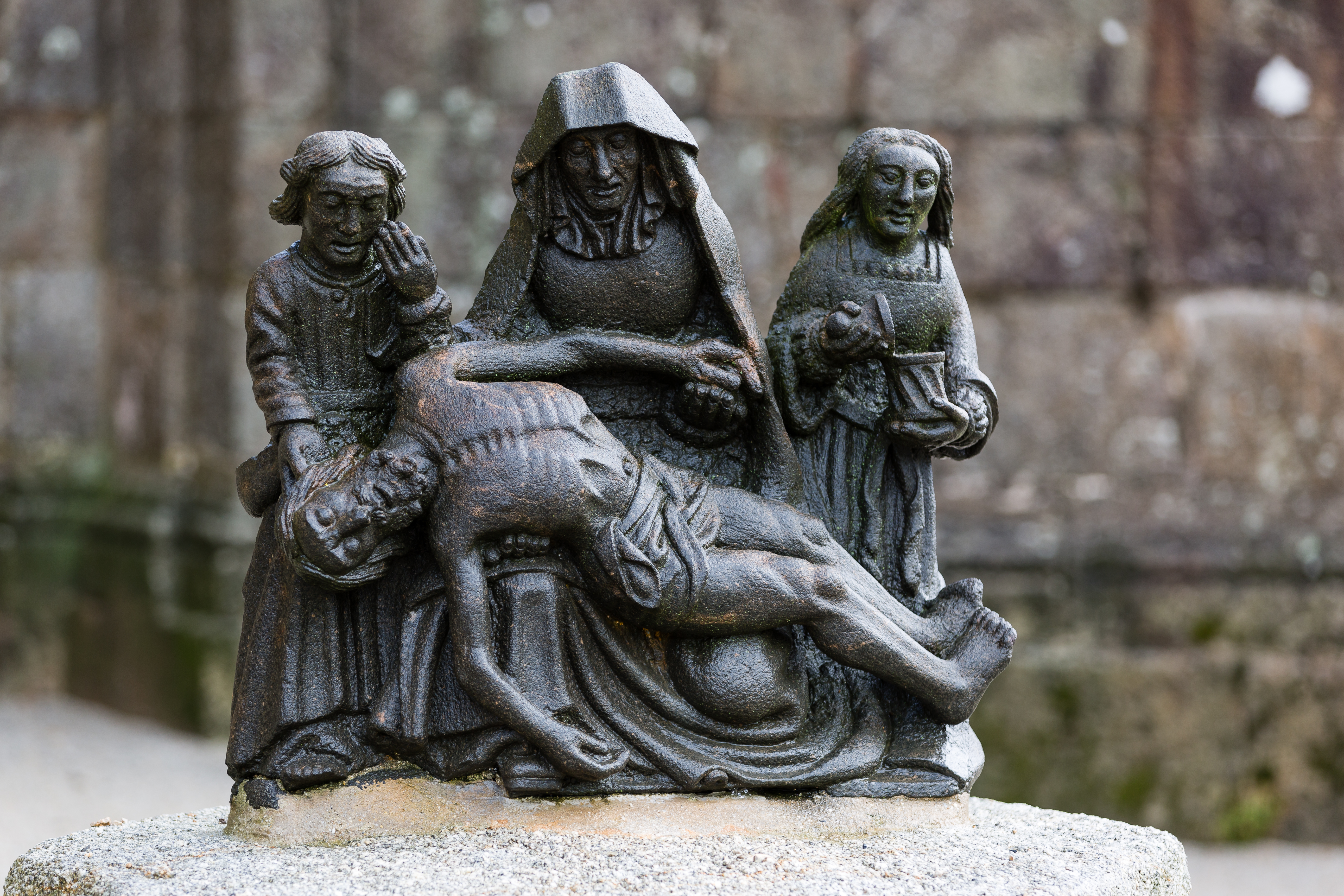 Pietà (reste de l'ancien calvaire) de l'église Saint-Suliau de Sizun (France).